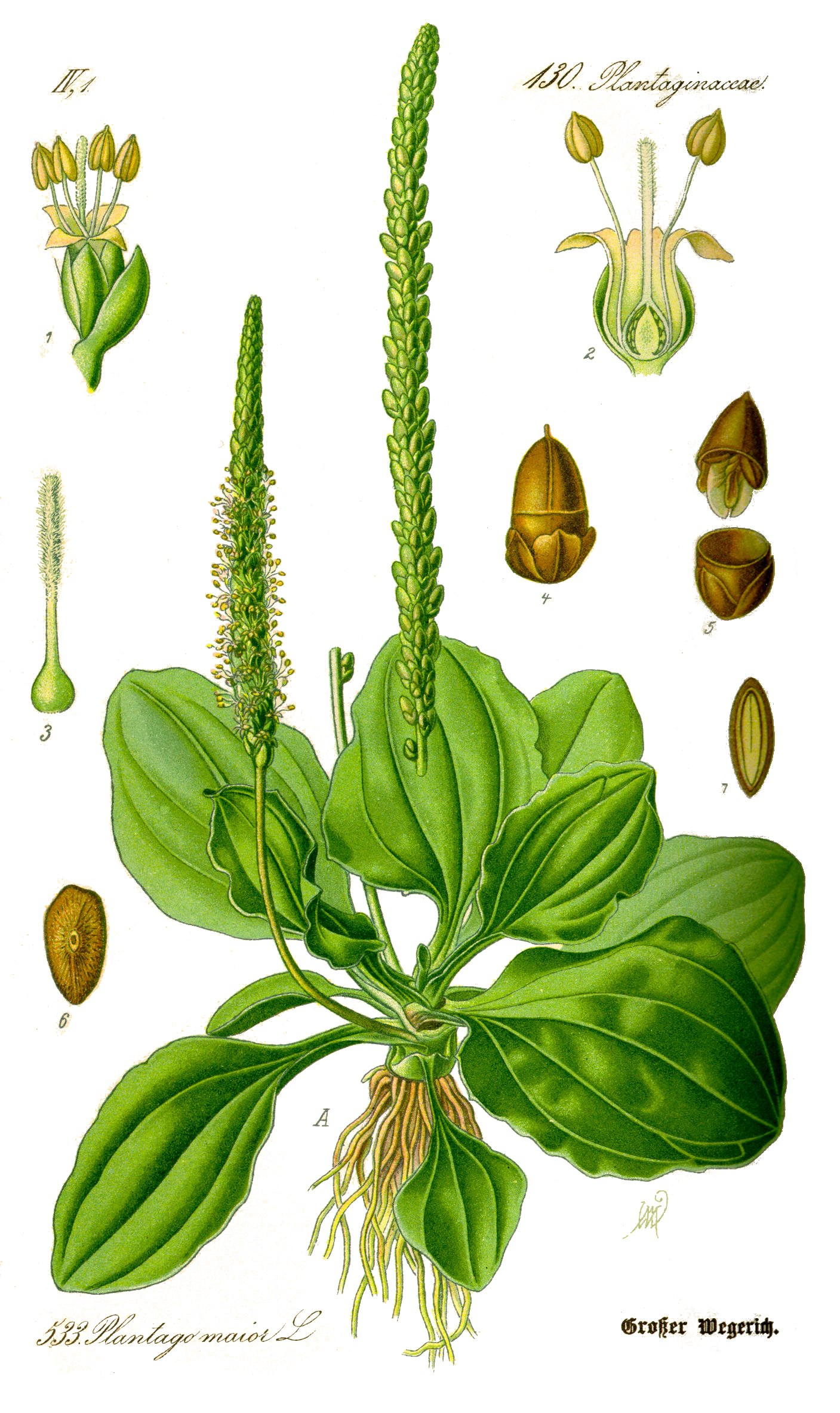 Name Plantago major Family Plantaginaceae